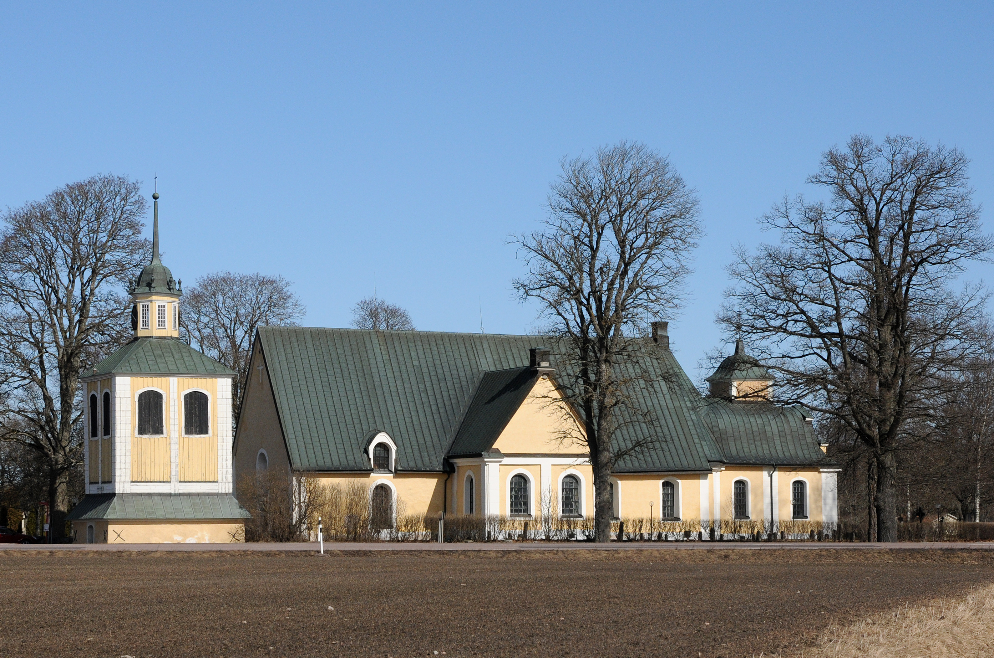 Stora Malms kyrka i Katrineholms kommun